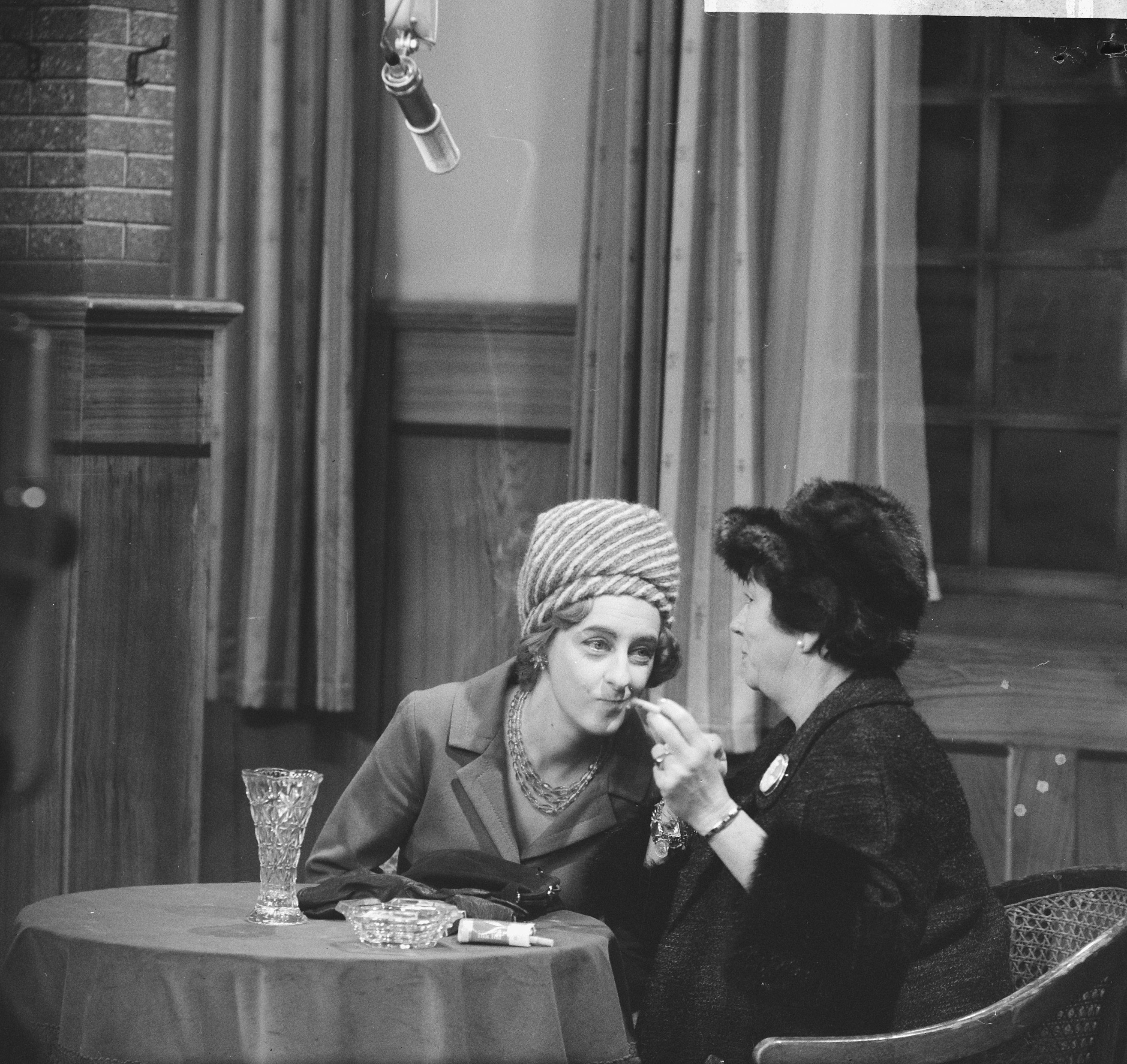 Collectie / Archief : Fotocollectie Anefo Reportage / Serie : [ onbekend ] Beschrijving : Het vijfde slachtoffer TV-stuk Datum : 30 december 1965 Trefwoorden : slachtoffers Fotograaf : Nijs, Jac. de / Anefo Auteursrechthebbende : Nationaal Archief Materiaalsoort : Negatief (zwart/wit) Nummer archiefinventaris : bekijk toegang 2.24.01.03 Bestanddeelnummer : 918-6240 Reacties Geplaatst door Toneelliefhebber op 05 september 2017 - 15:17. KRO Televisie. TV-spel. Thriller. Links Ellen de Thouars, rechts Carla de Raet NB. Uitgezonden op 24 maart 1966